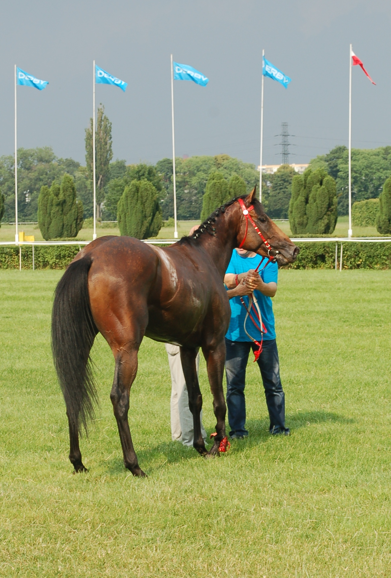 Presidents Derby 2012 Warsaw, Mr Great (nr 11) with broken leg